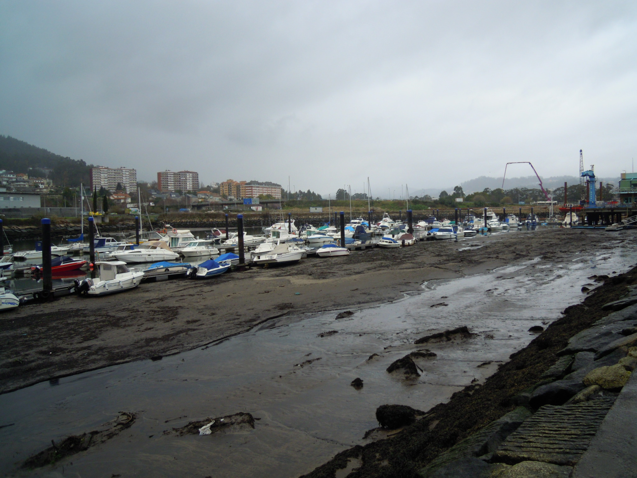 Porto deportivo de Pontevedra coa marea baixa en tempo de mareas vivas